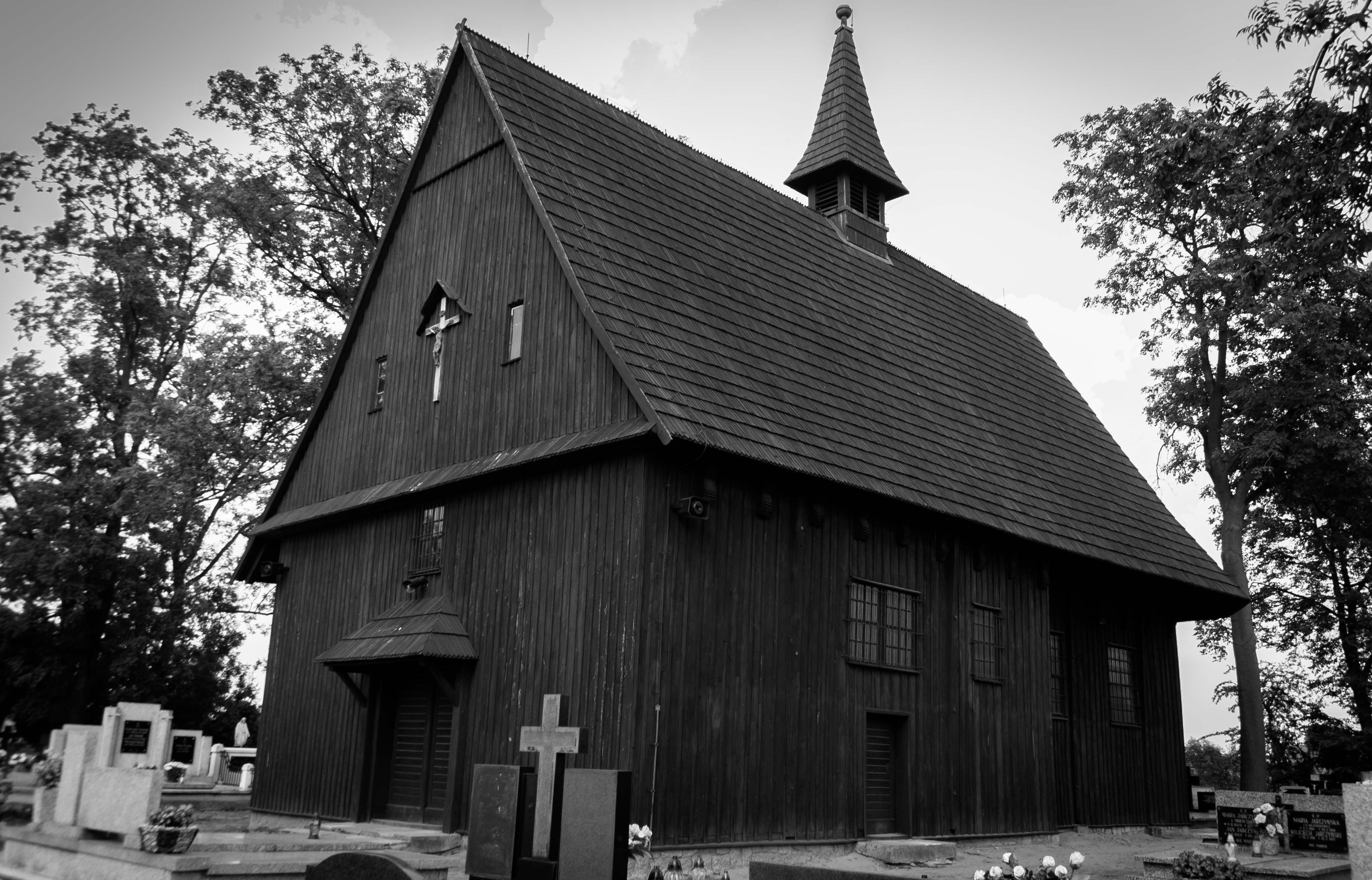 Koźmin Wielkopolski, kościół fil. p.w. Św. Trójcy, 1570